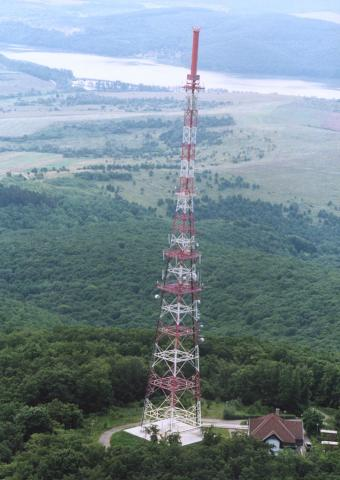 Rakaca, Hungary, aerialphotography